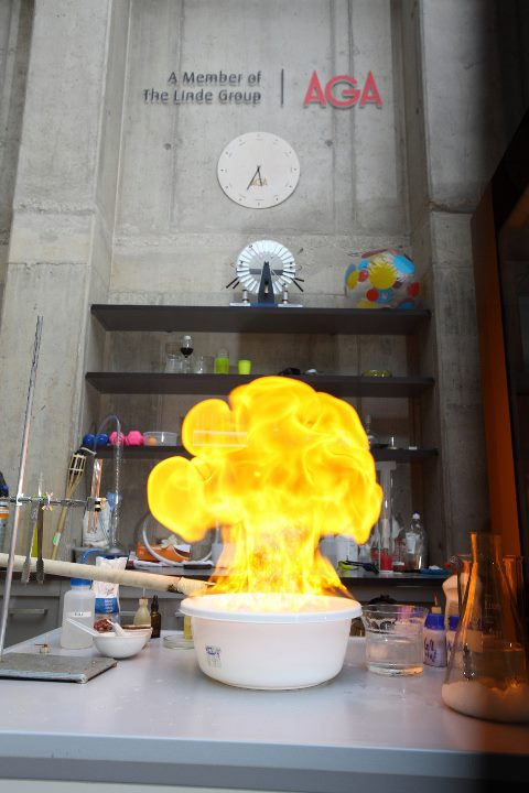 Seebivette lasin balloonist gaasilist vesinikku ning andsin tikuga süttimistemperatuuri.